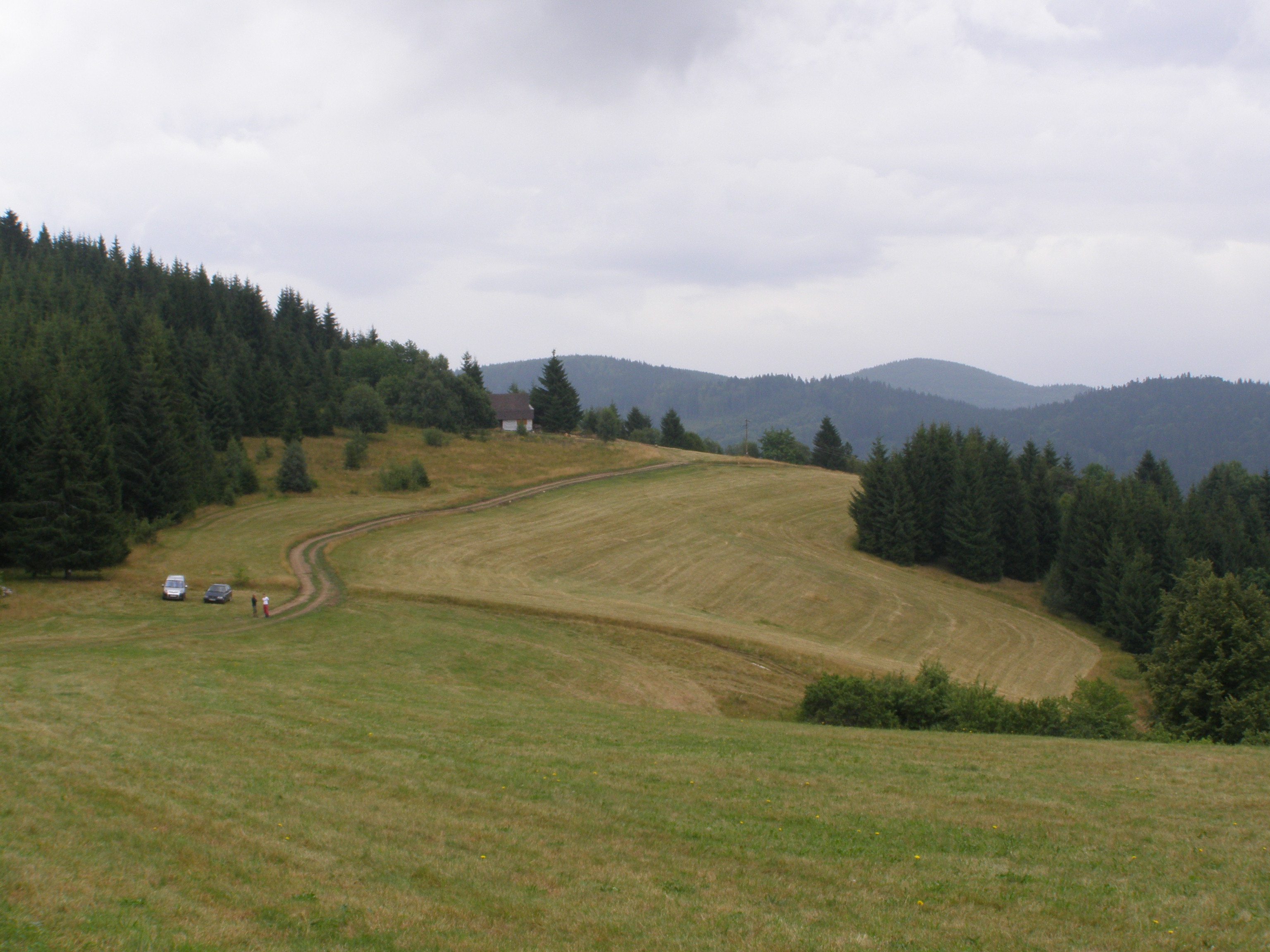 Slovenské rudohoří, Veporské vrchy, Balocké vrchy, hřeben vedoucí z vrcholu Sedmák (1006 m) na východ